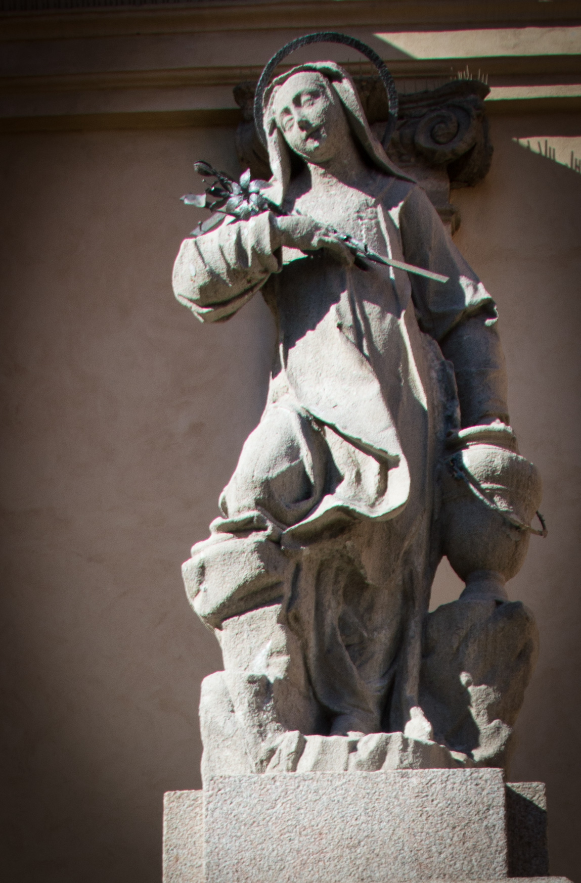 Statua della beata Giuliana Puricelli This is a photo of a monument which is part of cultural heritage of Italy.